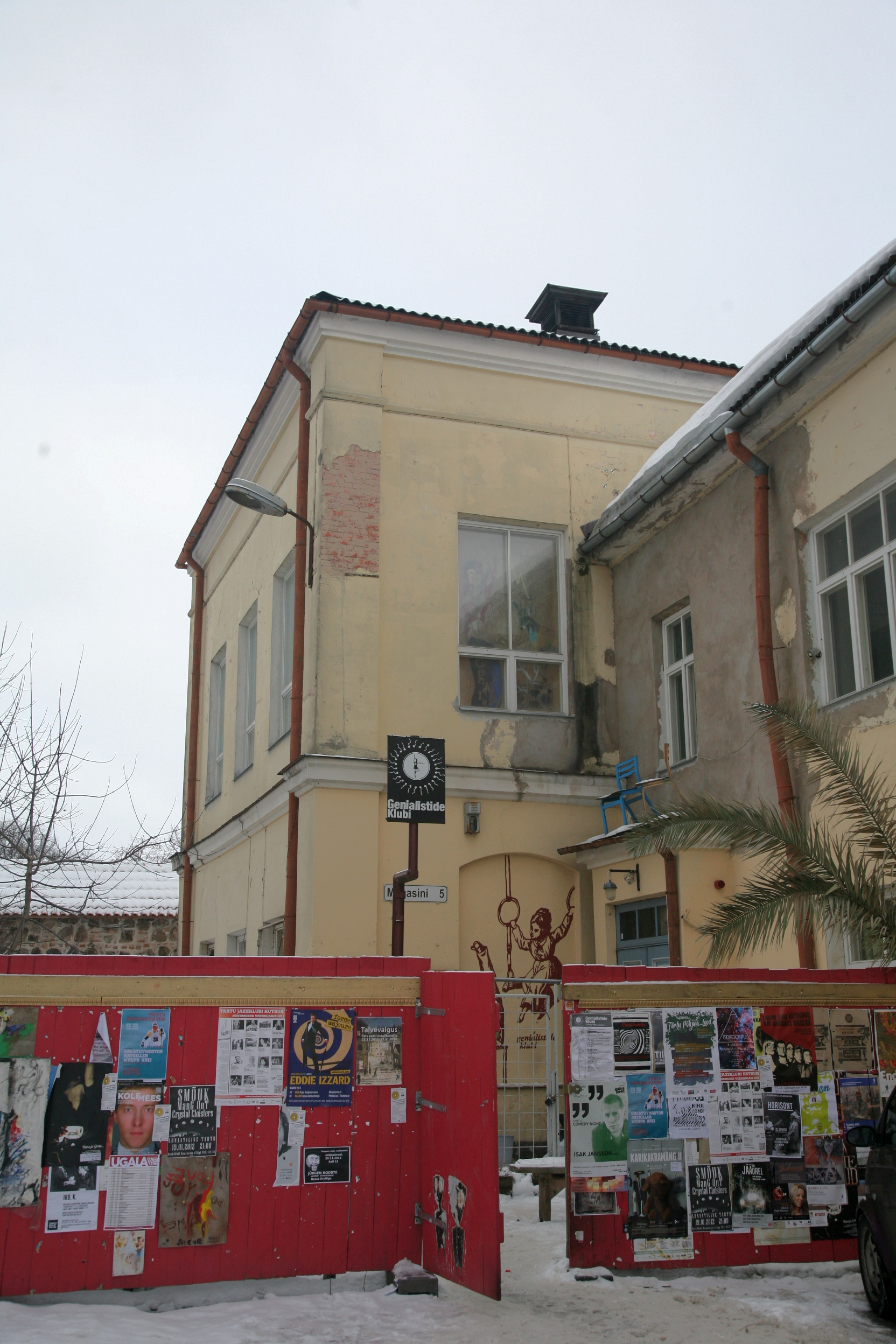 Genialistide Klubi hoone Tartus Magasini tänaval, 3. veebruar 2013.